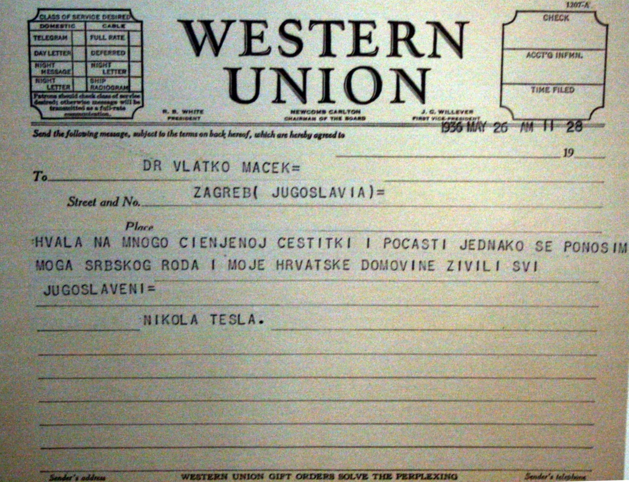 Brzojav Nikole Tesle Vlatku Mačeku